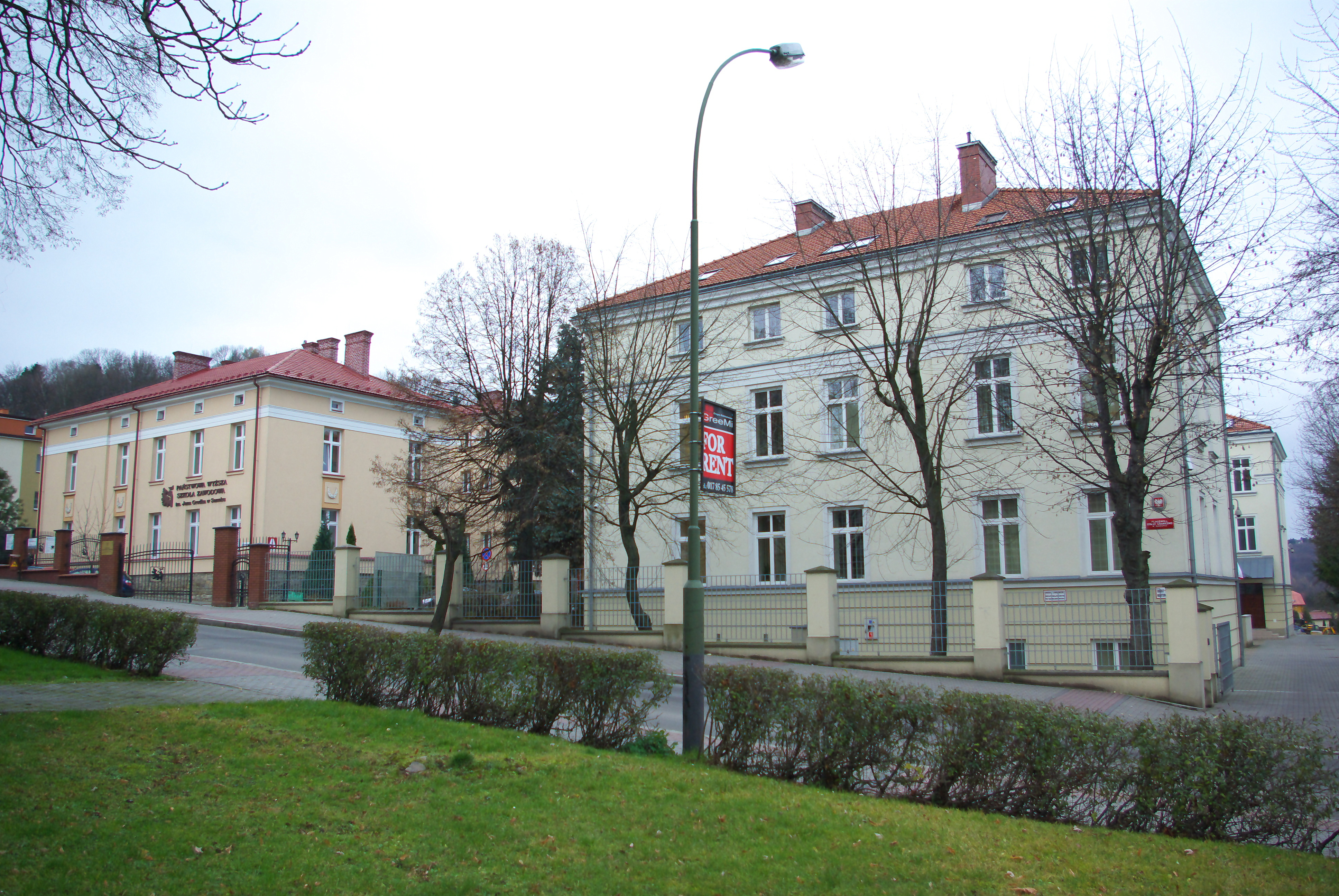 Budynki przy ul. Mickiewicza 21 i 23 w Sanoku.